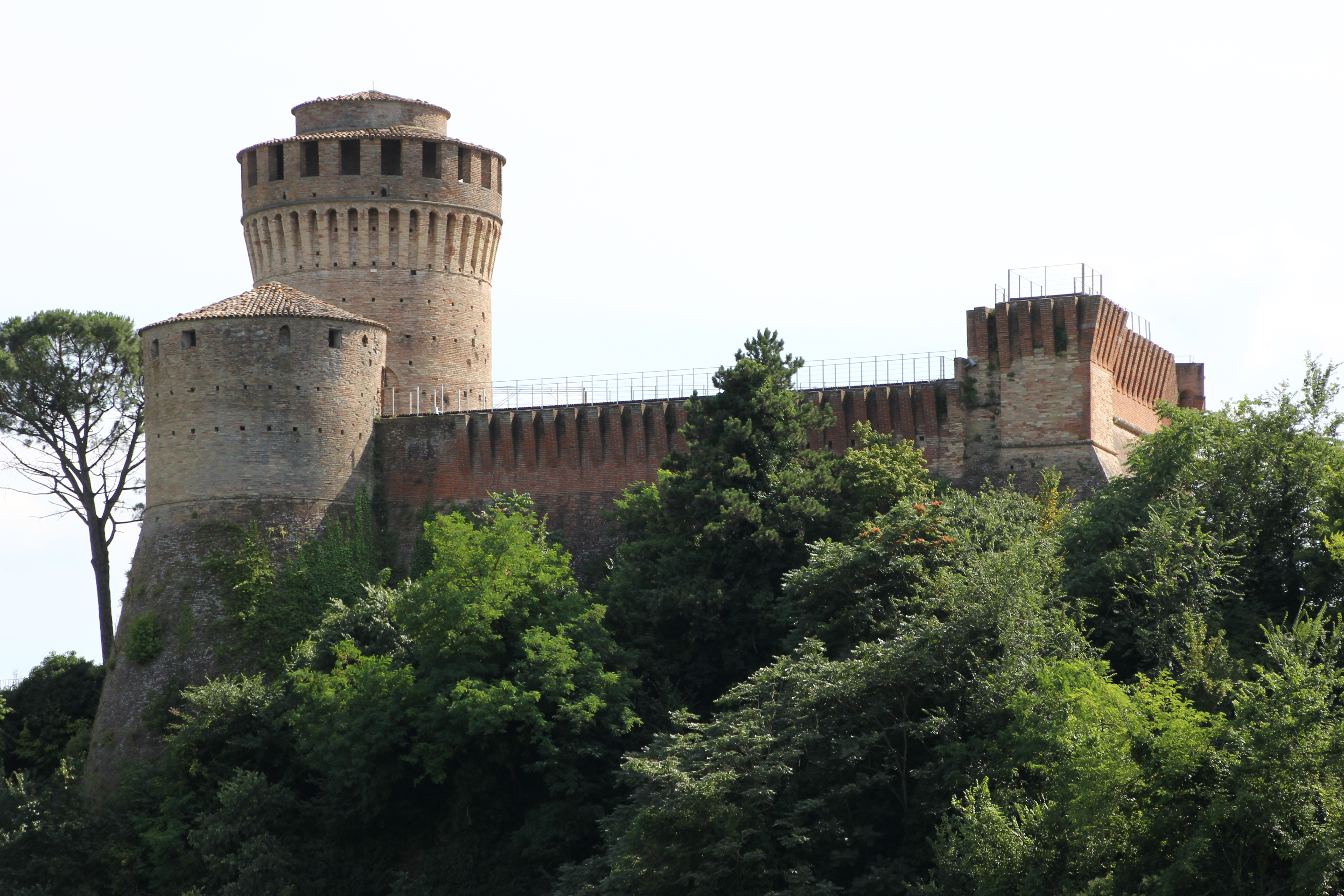 Brisighella, rocca Manfrediana